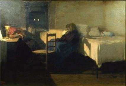 La guardia alla ruota dei trovatellilabel QS:Lit,"La guardia alla ruota dei trovatelli"